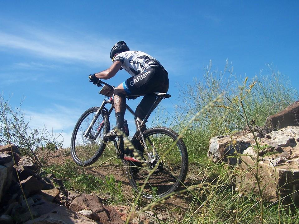 "Nego" Soutto en una de sus carreras